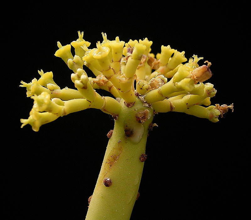 Euphorbia alluaudii (Syn.: E. leucodendron)